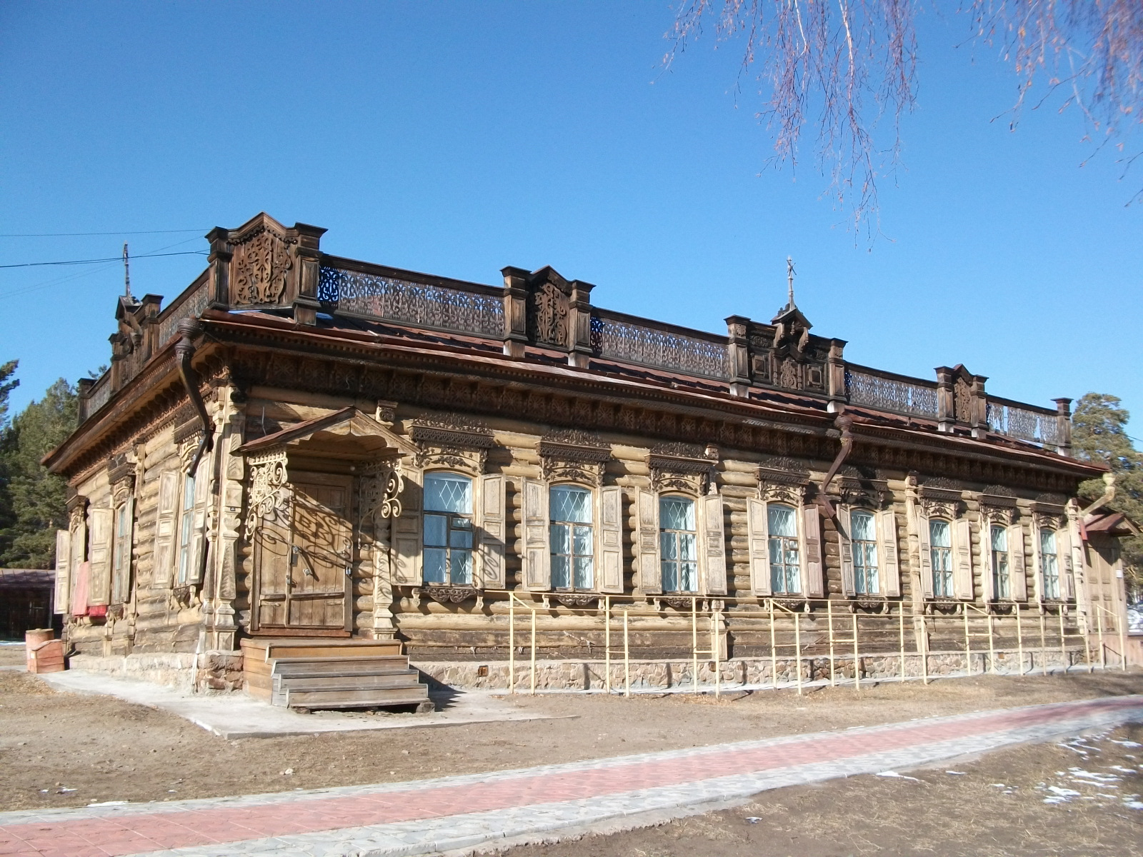 Жилой доходный дом коридорного типа из г. Улан-Удэ (Республика Бурятия, Улан-Удэ, посёлок Верхняя Березовка, перевезен из город Улан-Удэ, улица Ленина, 67, Этнографический музей народного деревянного зодчества)